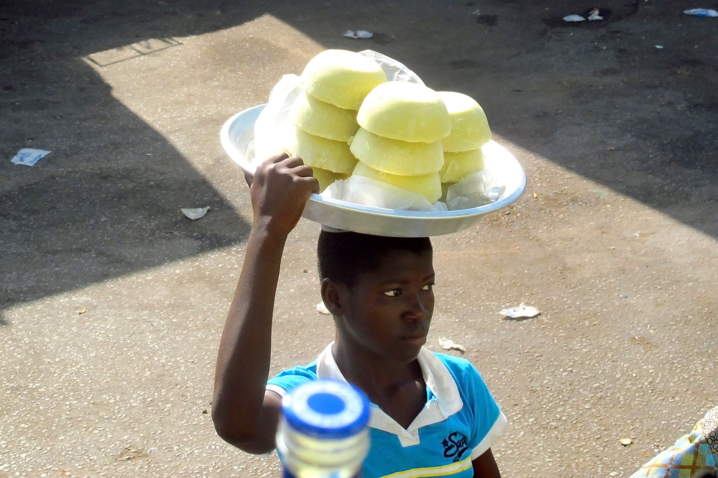 vendeuse de beurre de karité dans la commune de Tafiré, au nord de la Côte d'Ivoire This is an image of "African people at work" from Ivory Coast